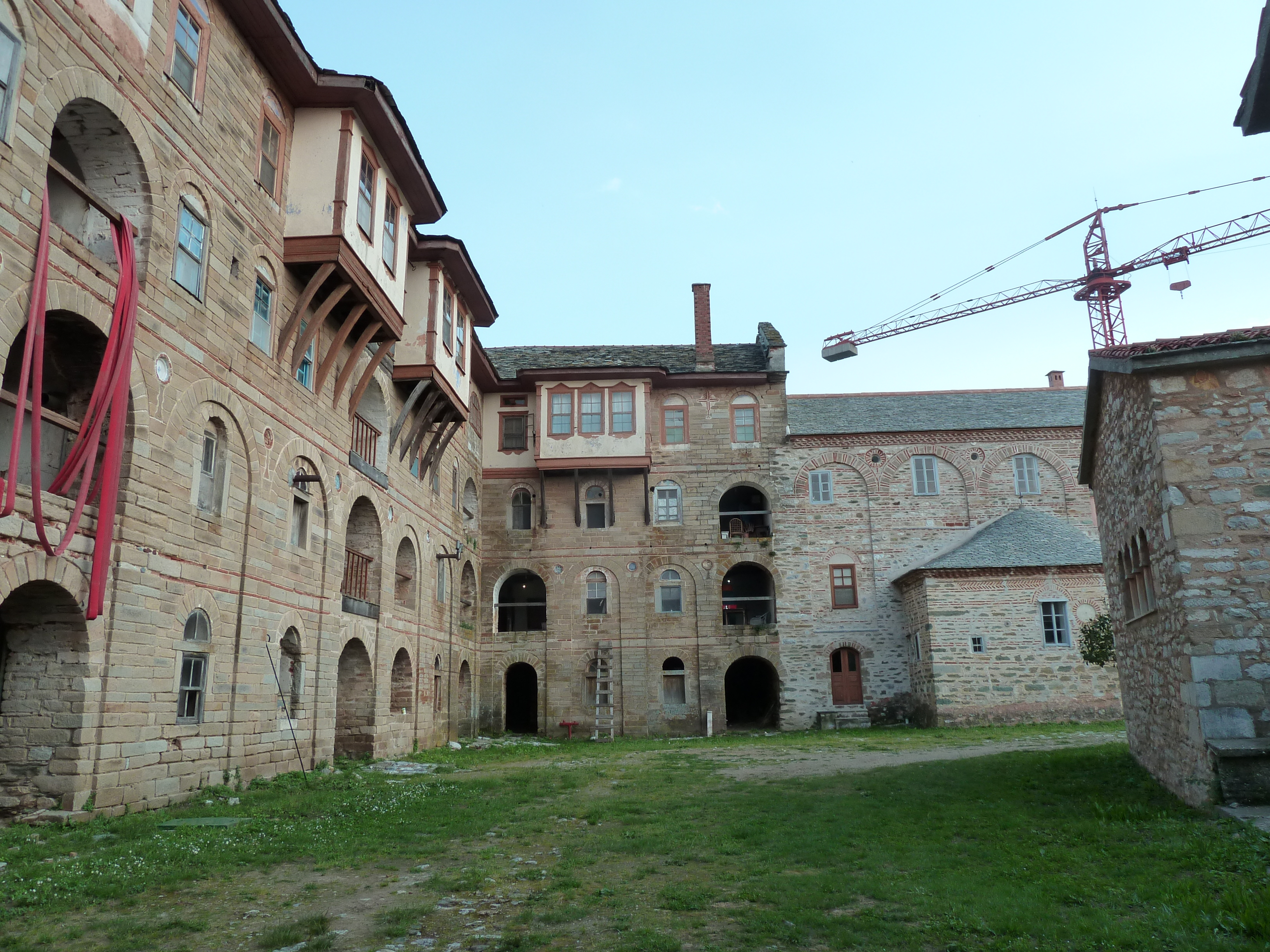 Cour intérieure du monastère de la Grande Laure (Mont Athos)